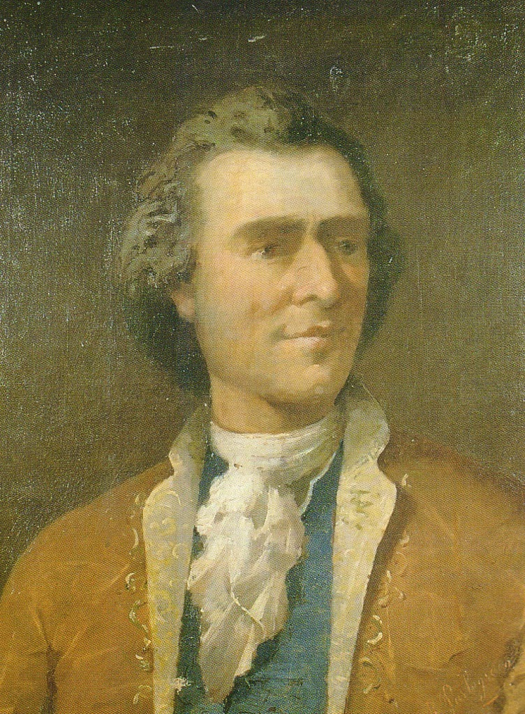 Depicted person: Domènec Terradellas (1713-1751)